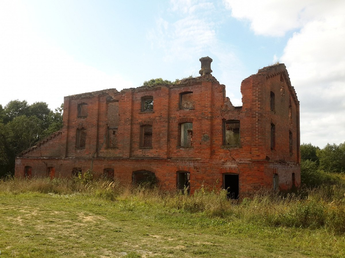 Каменнае Крывое. Вадзяны млын